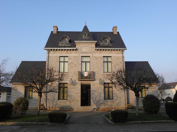 Mairie de Médréac (35).